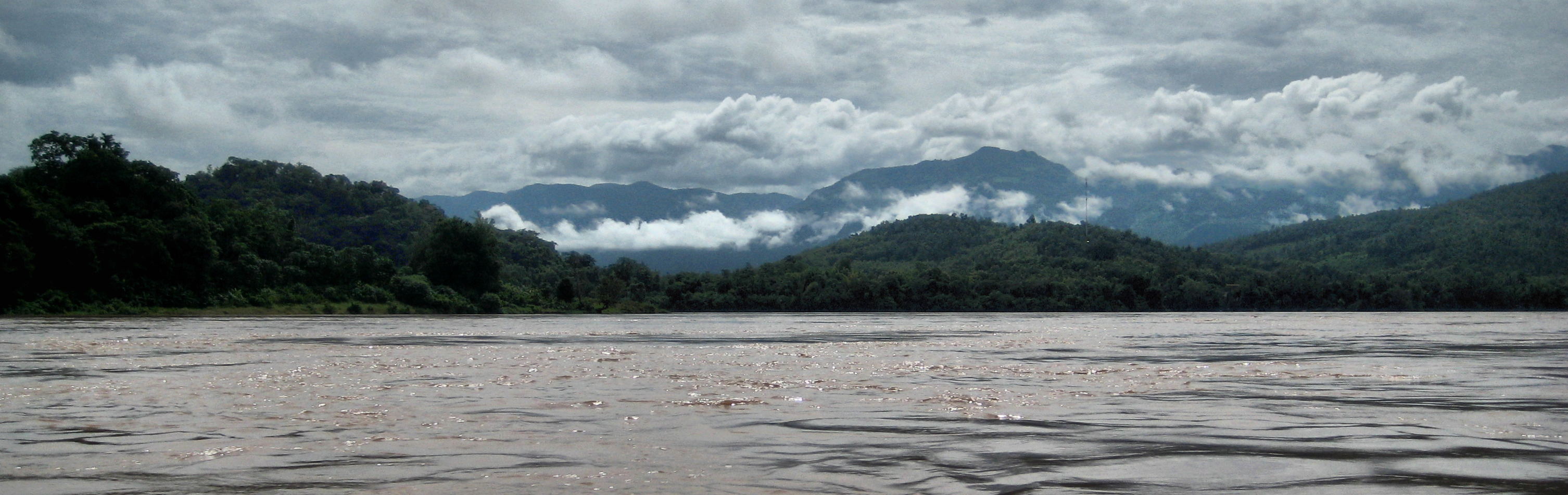 Mekong River in Laos